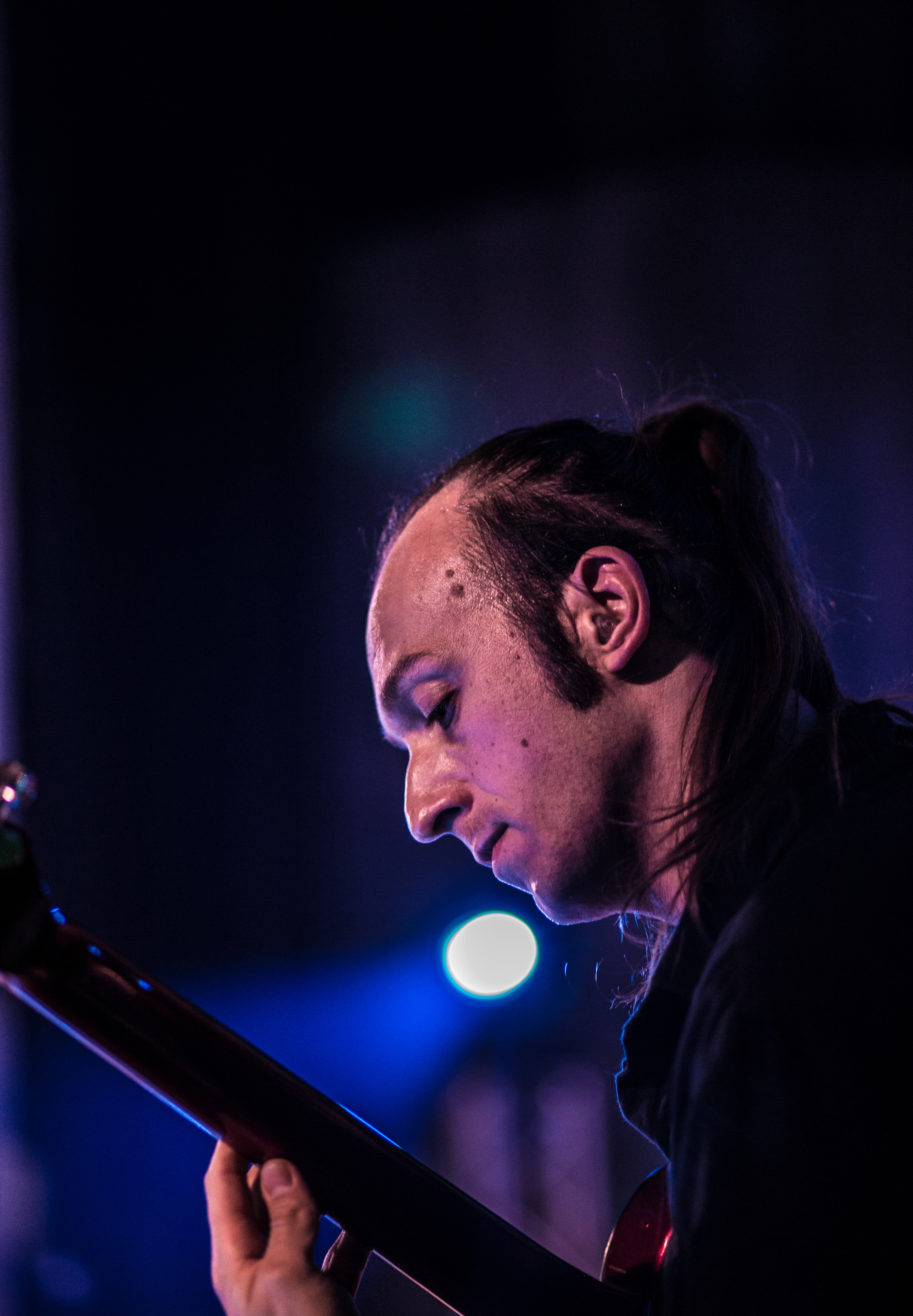 Empyrium à Strasbourg - 2017